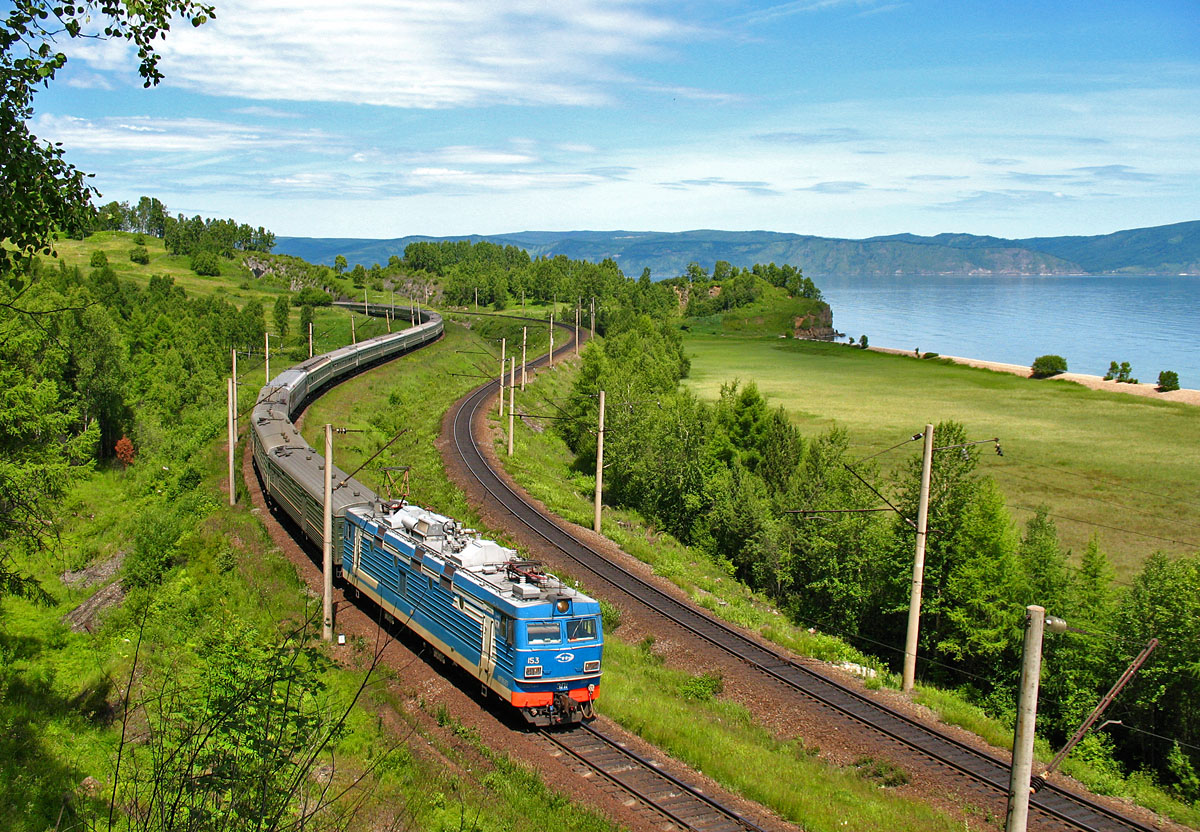 ЭП1-153